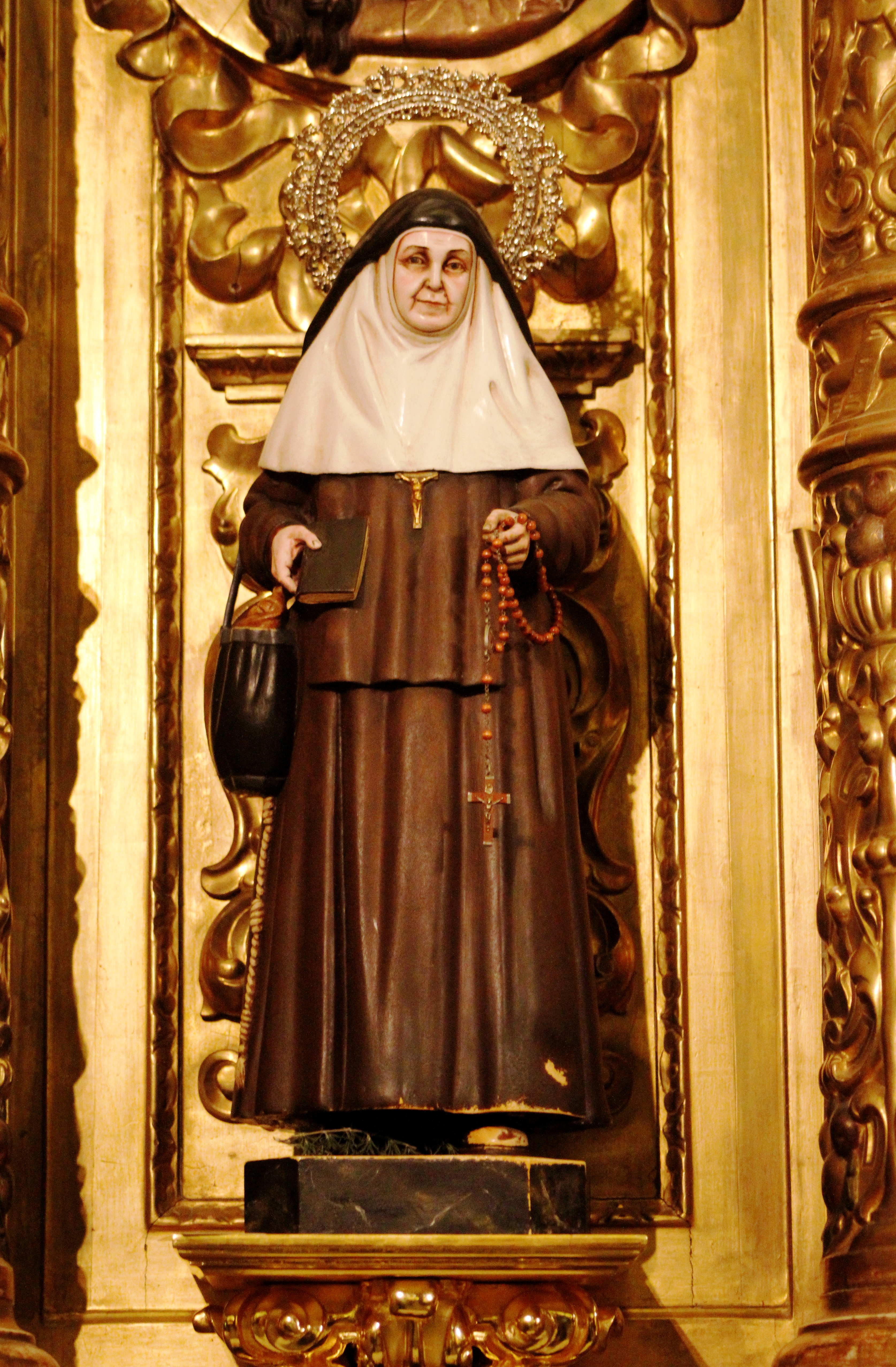 Santa Angela de la Cruz, fundadora de la Congregación de las Hermanas de la Cruz.